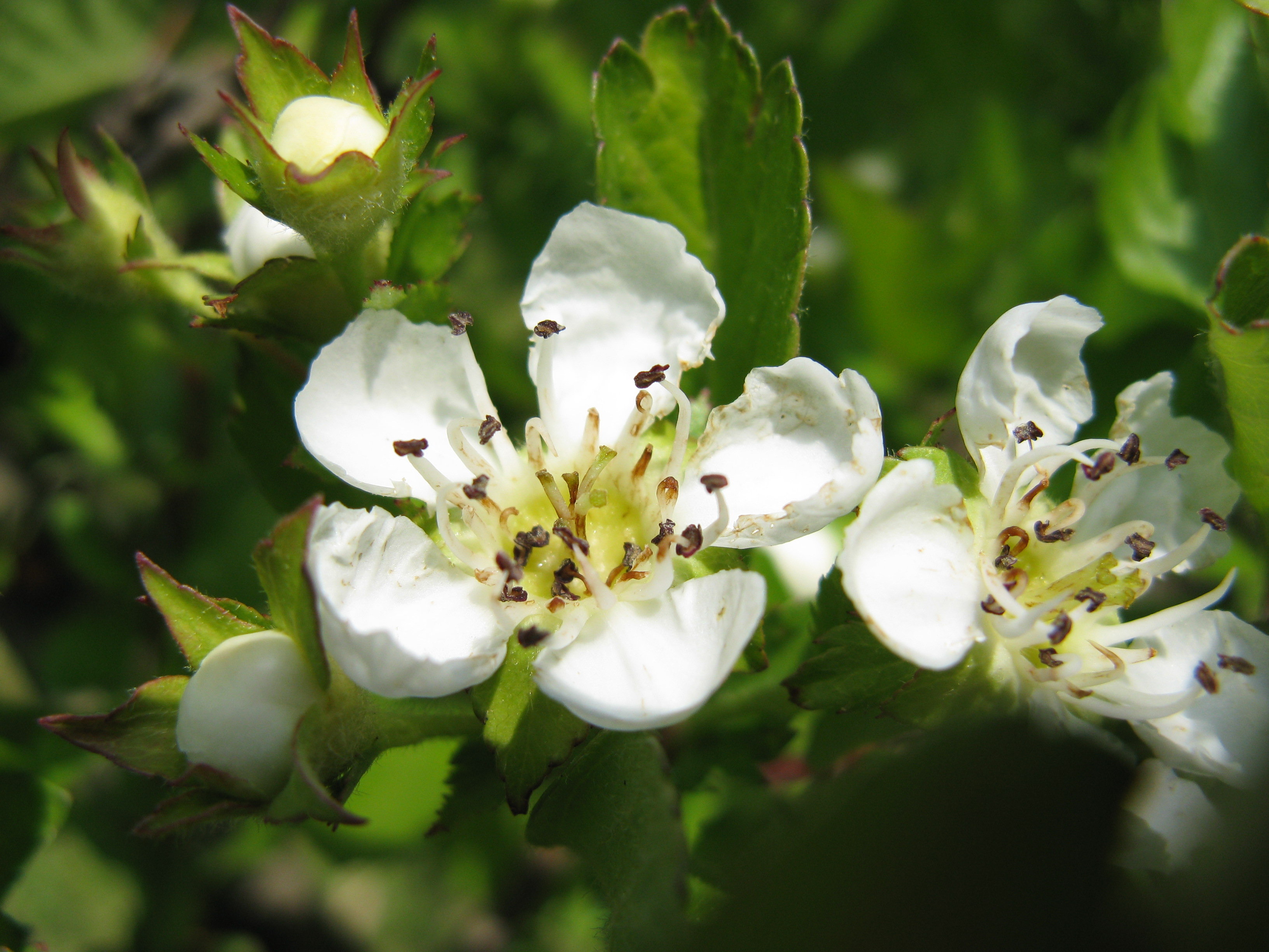 Scientific name Crataegus cuneata f. lutea